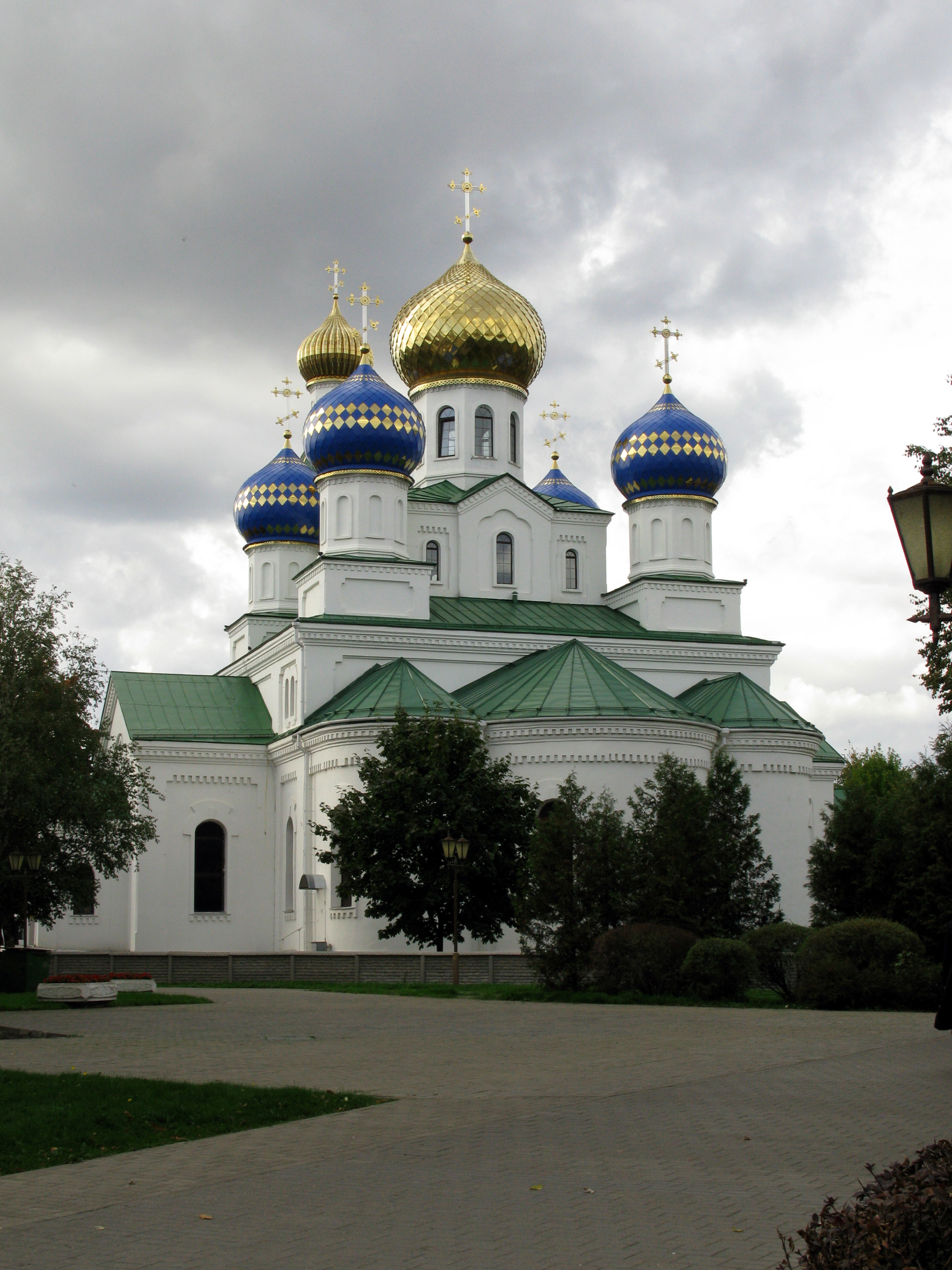 Никольский собор (Бобруйск, Могилёвская область, Белоруссия).